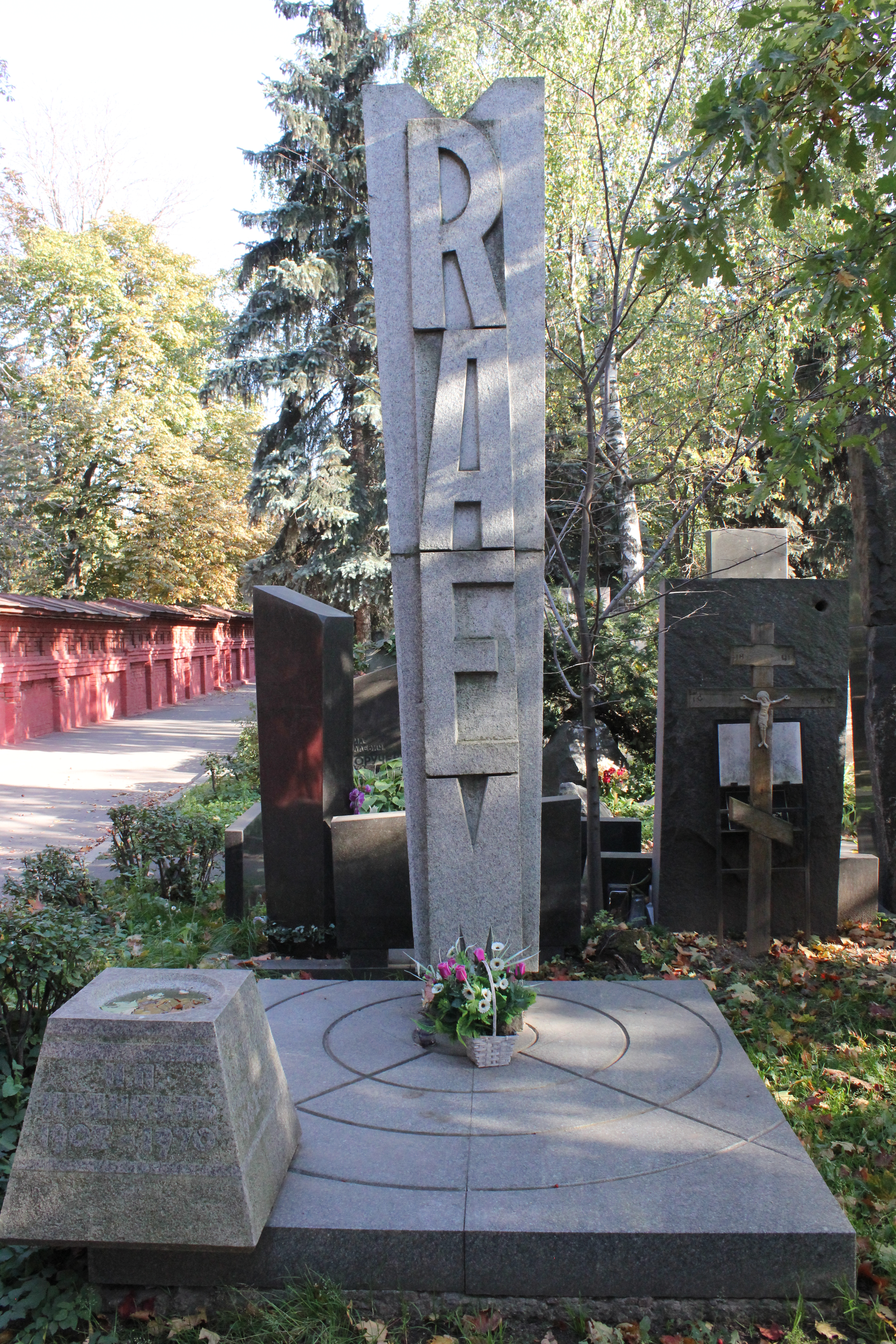 Могила Кренкеля Эрнста Теодоровича (1903-1971), географа, полярника: Новодевичье кладбище,7 уч. пр.ст. 18 ряд, Хамовники, Центральный округ, Москва